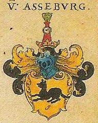 Wappen der Familie von Asseburg.